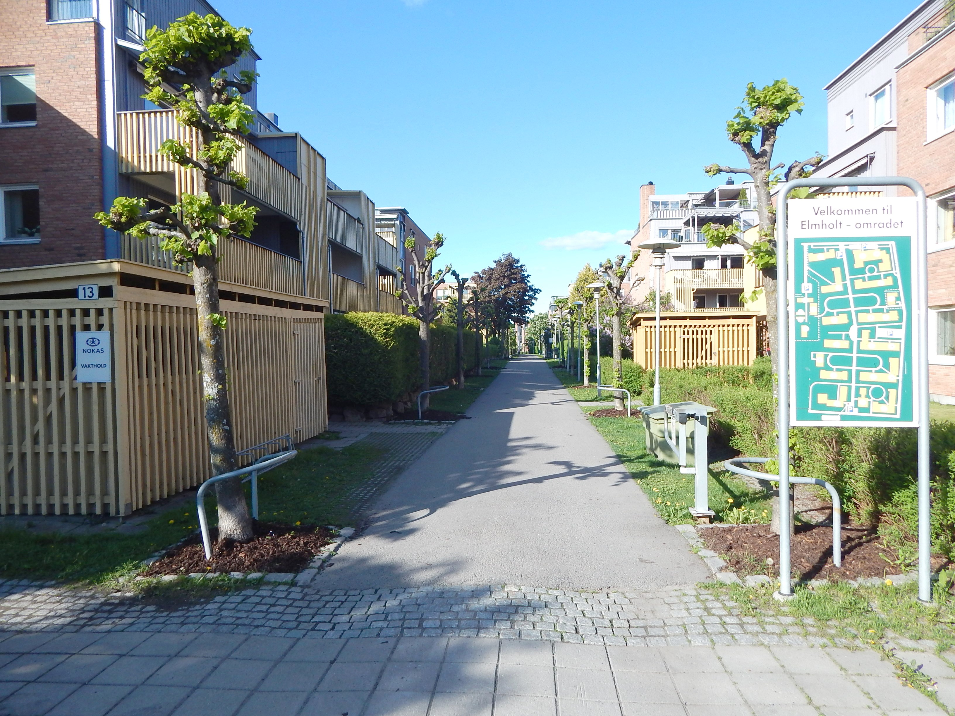 Elmholt allé sett fra Adventveien